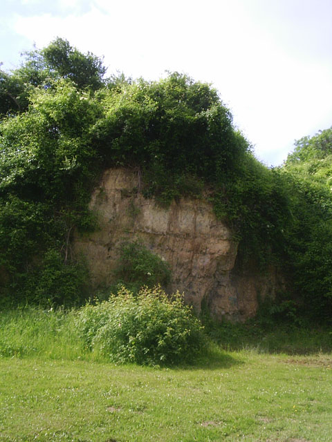 Groeve Midweg (Kunrade). Foto zelf gemaakt, 6 juni 2006